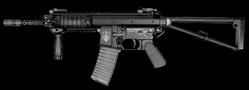 KAC PDW 6x35mm